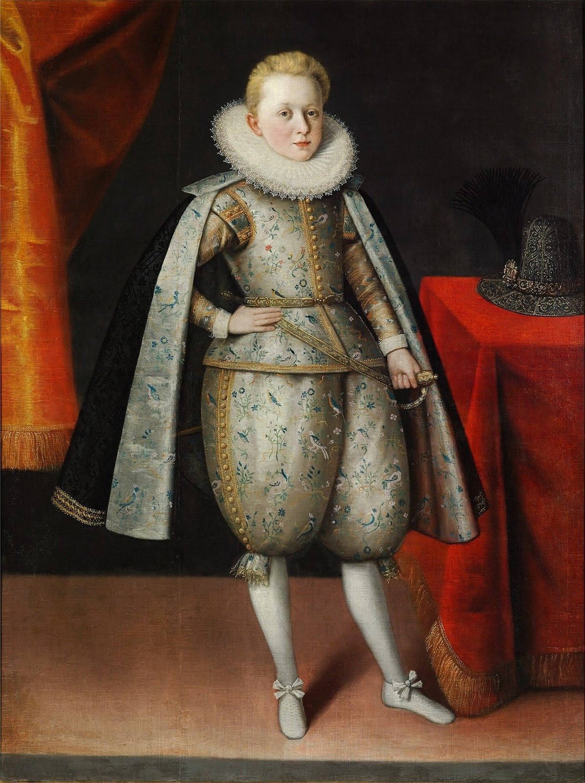 Władysław Sigismund